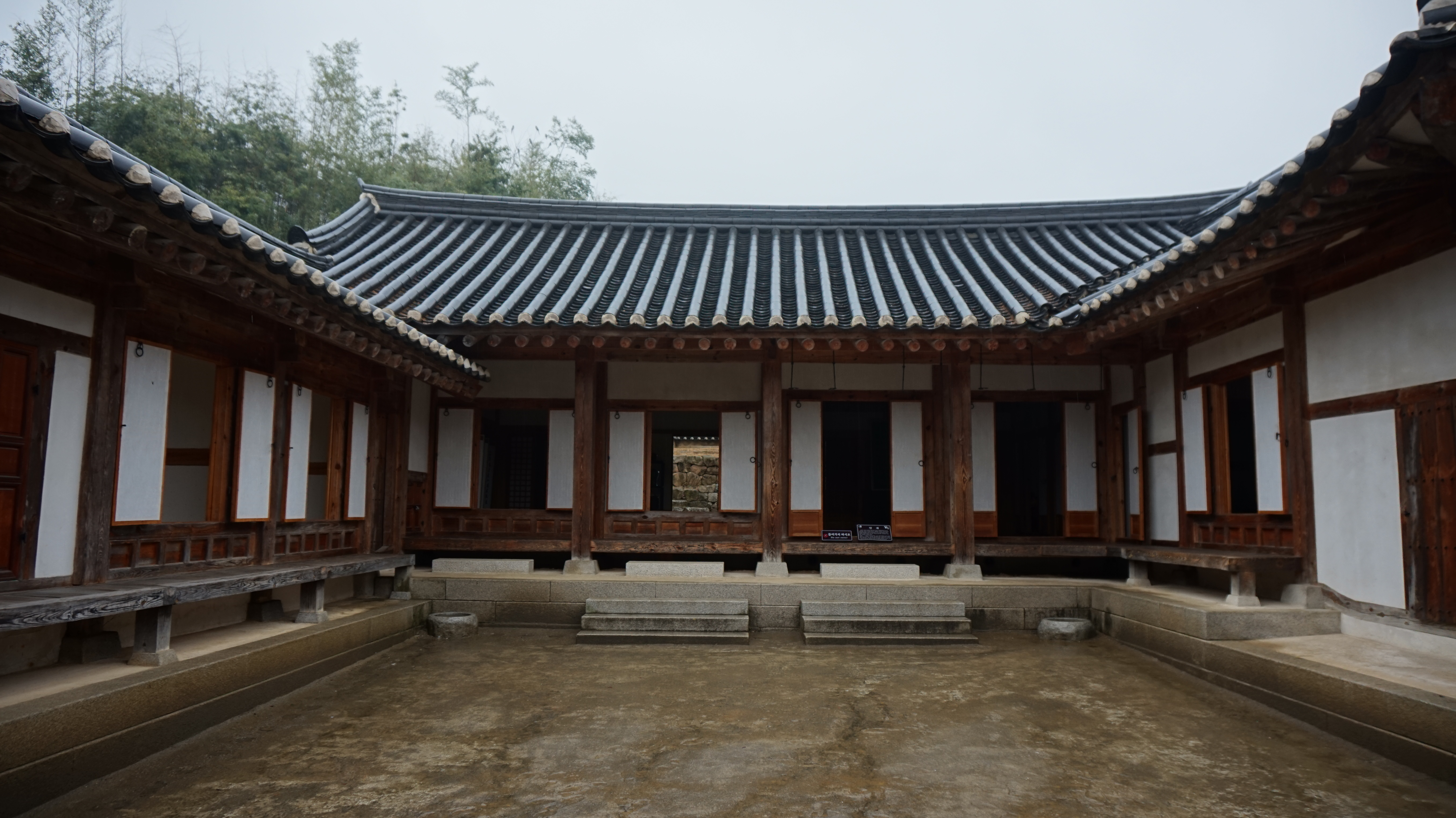 육영수 생가 안채 (2)